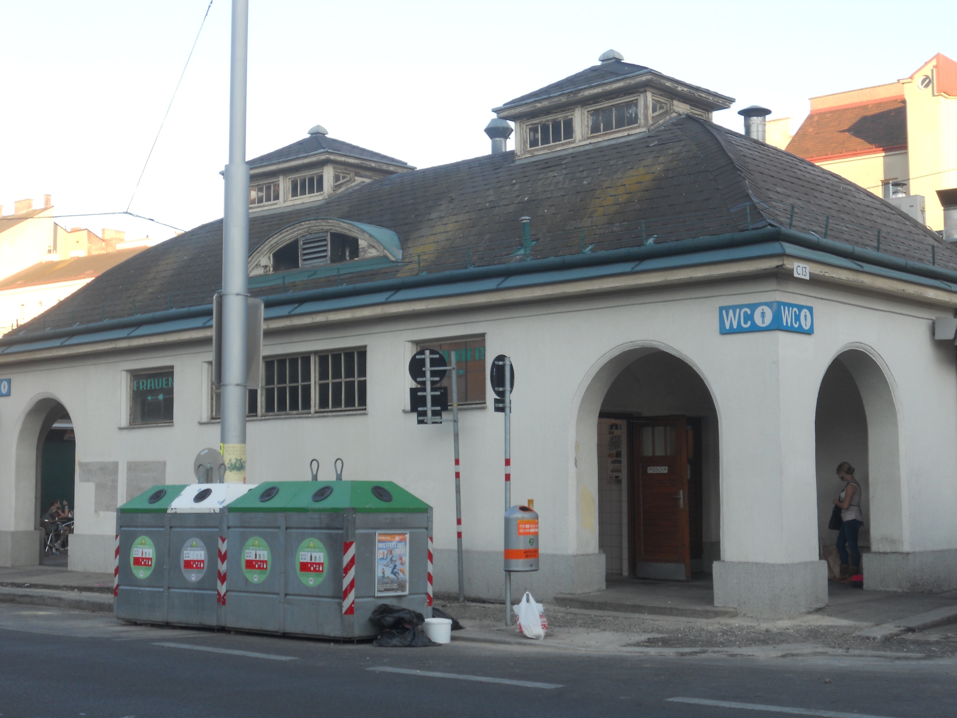 Öffentliche Toilette am Naschmarkt